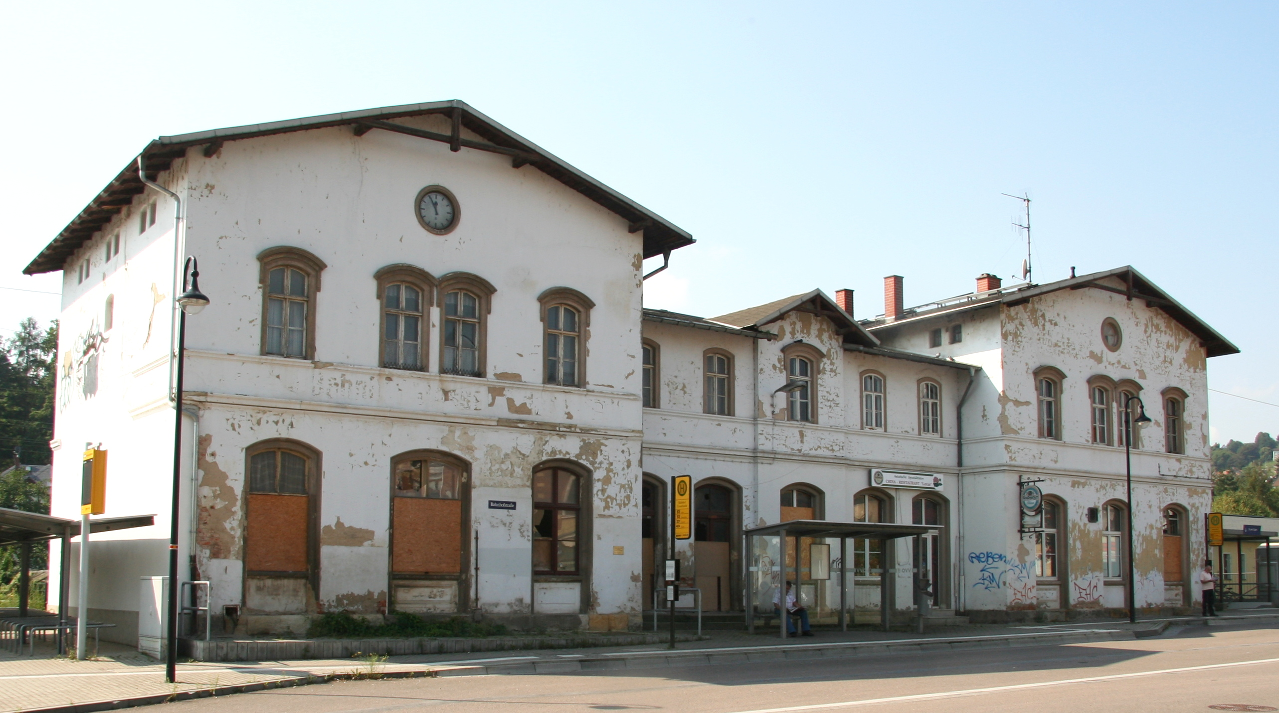 Empfangsgebäude am Bahnhof in Cossebaude, Bahnhofstraße 8